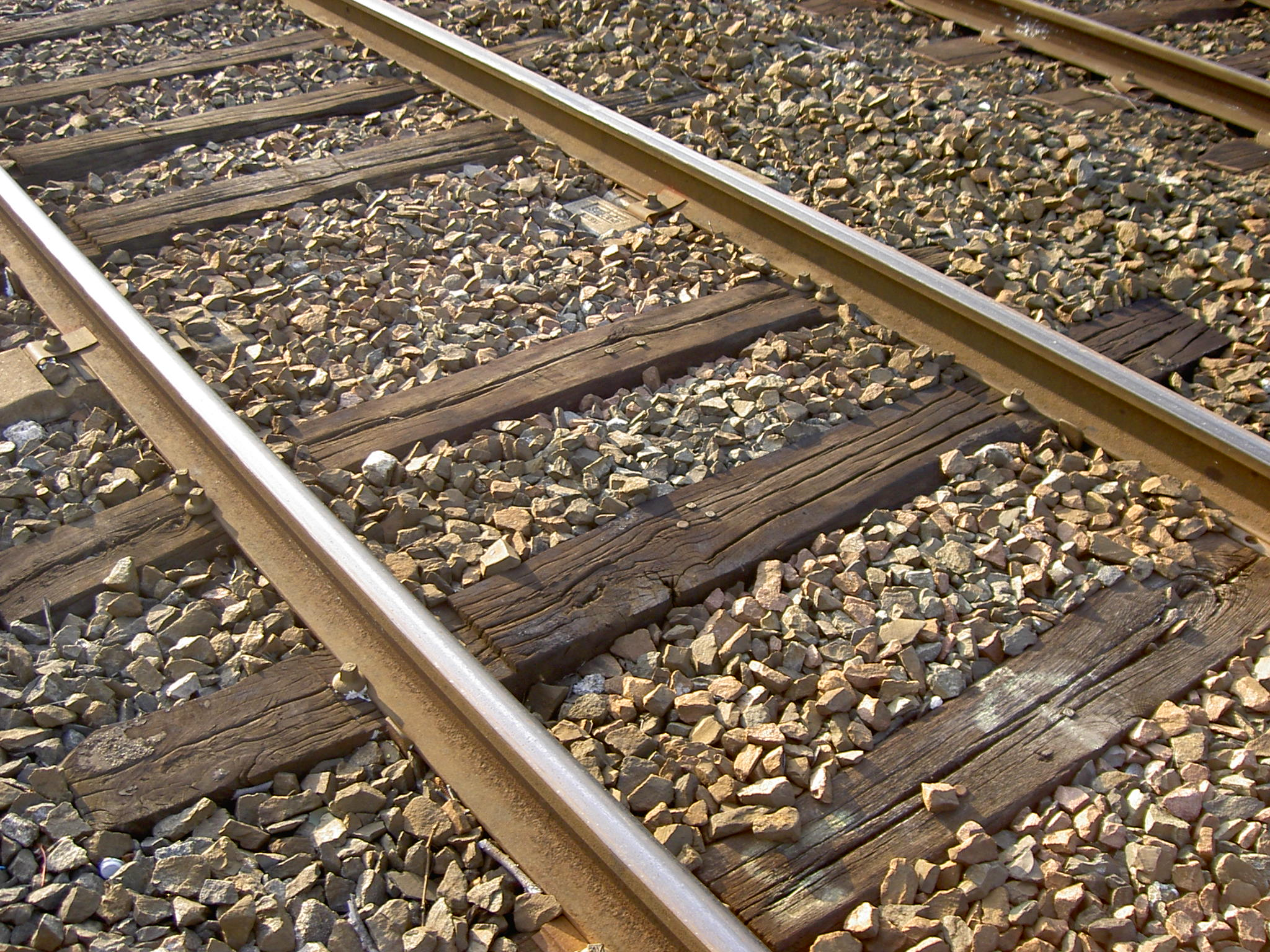 Photo de rails prise à Tonnay-Charente sur la ligne Bordeaux - La Rochelle